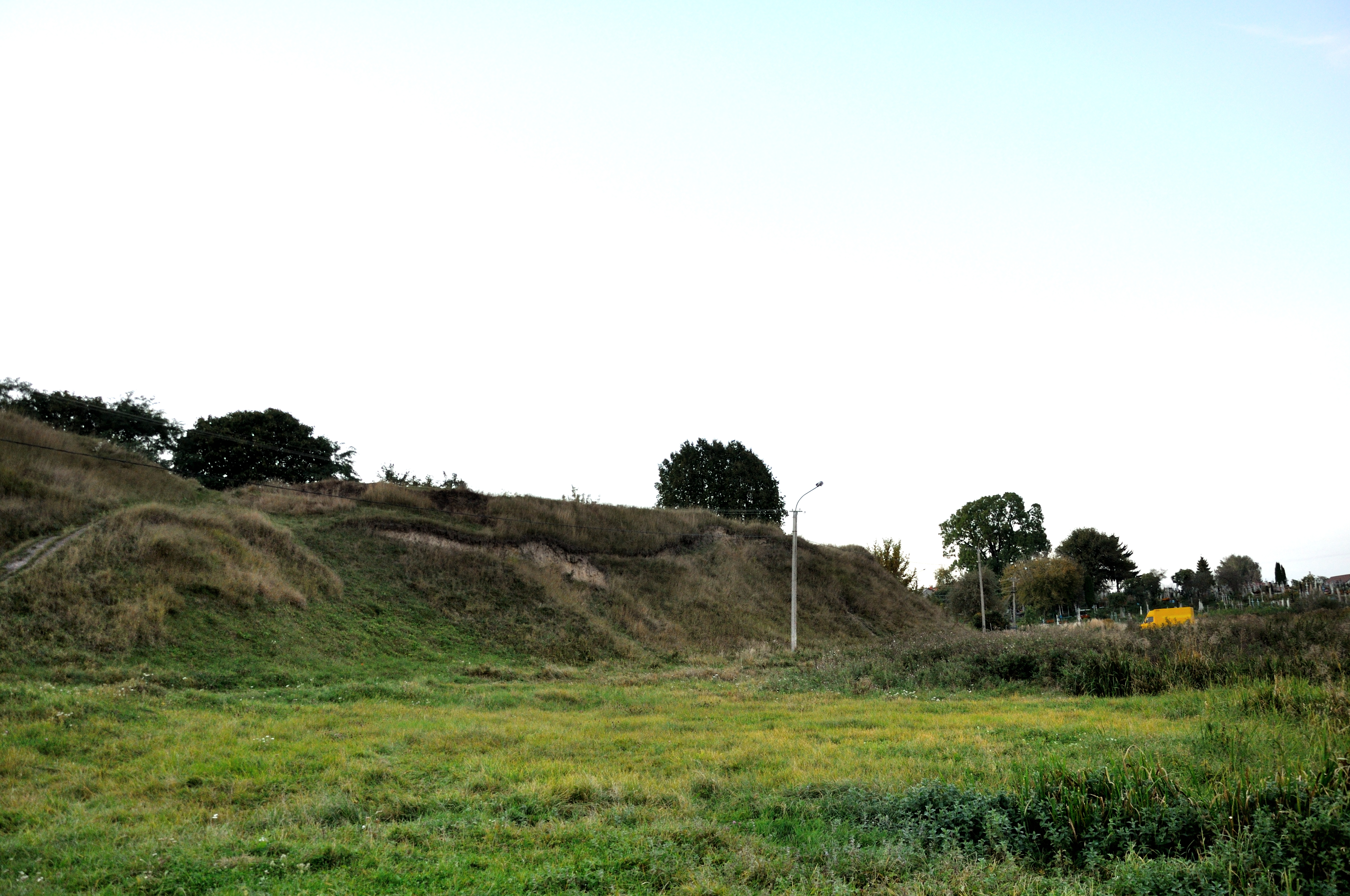 Городище, Рівне, вул. Басівкутська, 121